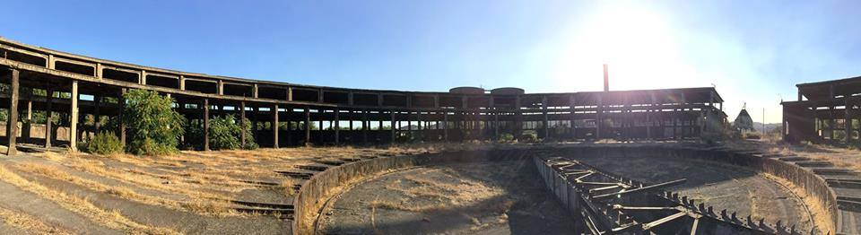 Al ver los rieles oxidados por la humedad imperante, y darme cuenta de la lenta agonía que sufre lo que alguna vez albergó el esfuerzo de nuestro pueblo, me viene de golpe a la mente los recuerdos del pasado glorioso que tanto me expresaba mi abuela en sus conmovedores relatos que inundaban mi corazón del sentimiento de ver en el futuro a mi pueblo floreciendo nuevamente y con mayor fervor Marcelo Muñoz Morales.San Rosendo, Chile